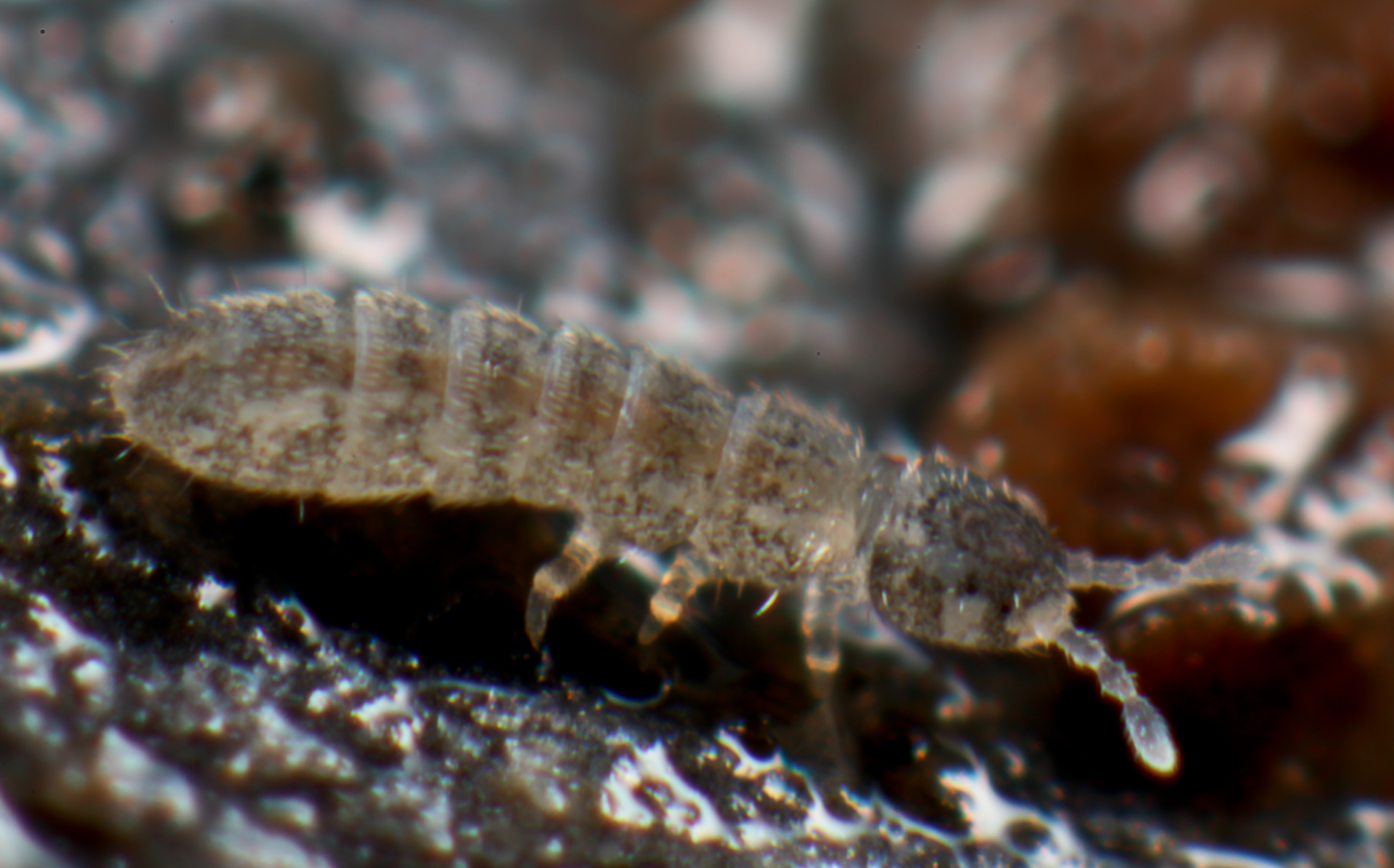 Folsomia quadrioculata from Switzerland.